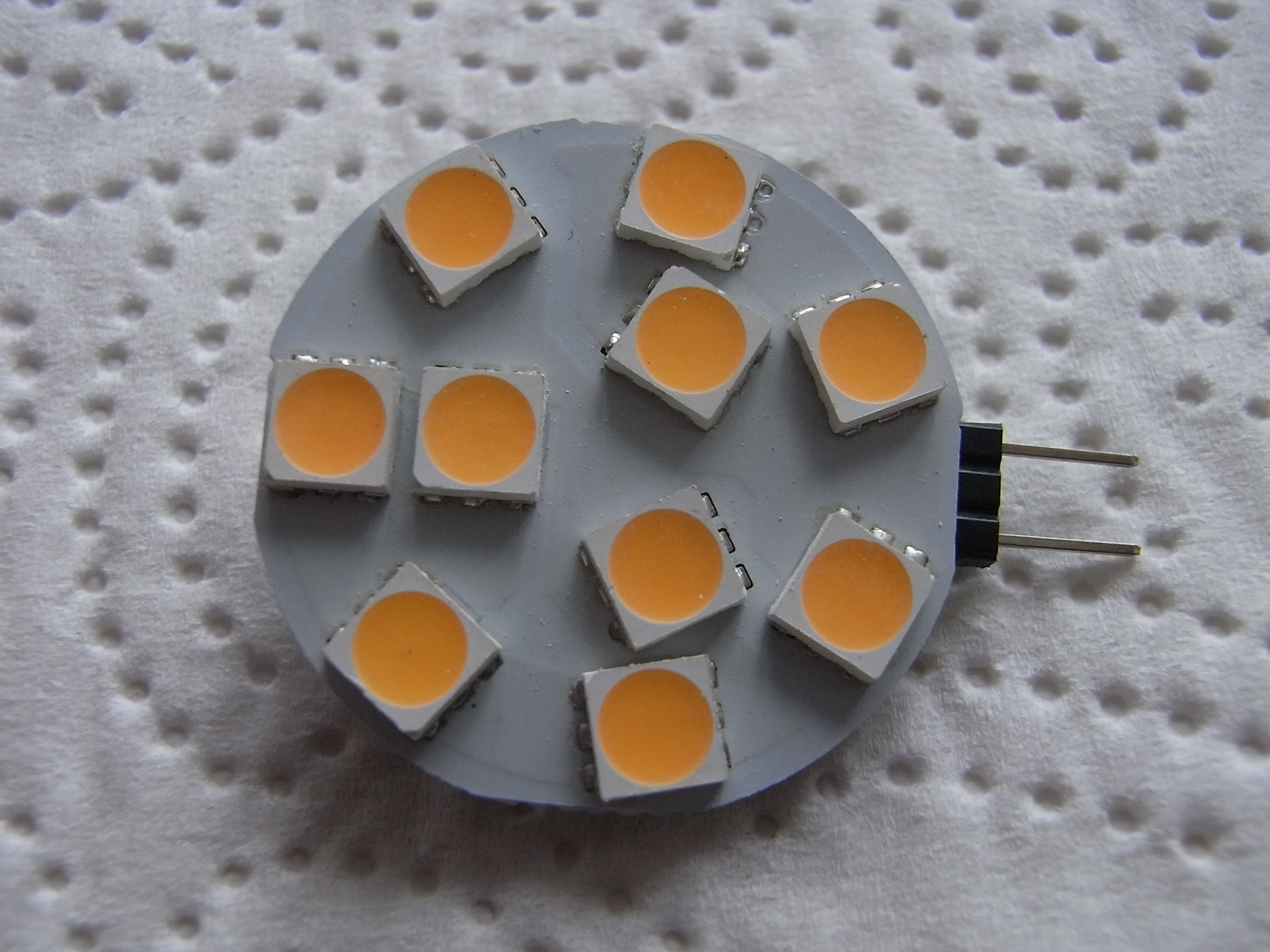 Standard-LED-Leuchtmittel mit Niedervolt-Halogen-Anschluss.